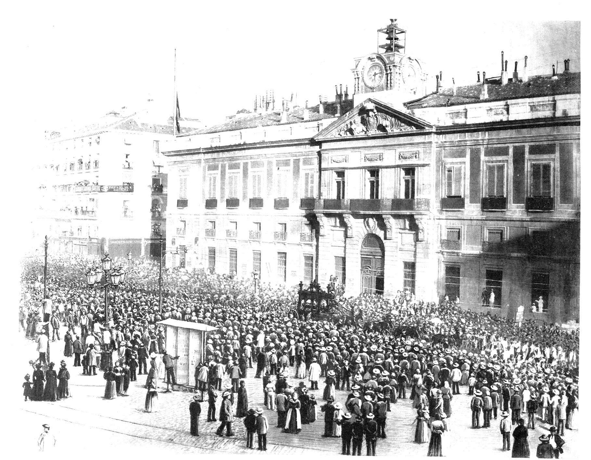 «Entierro de D. Emilio Castelar á su paso por la Puerta del Sol», en El Mundo Naval Ilustrado.